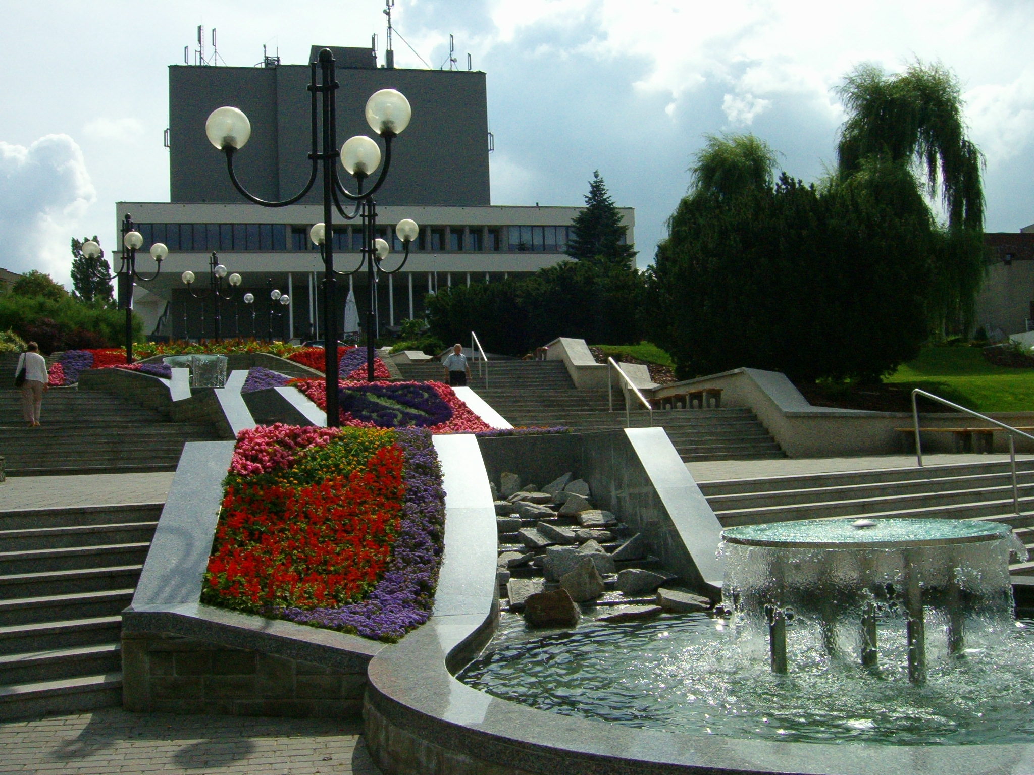 Teatr Ziemi Rybnickiej